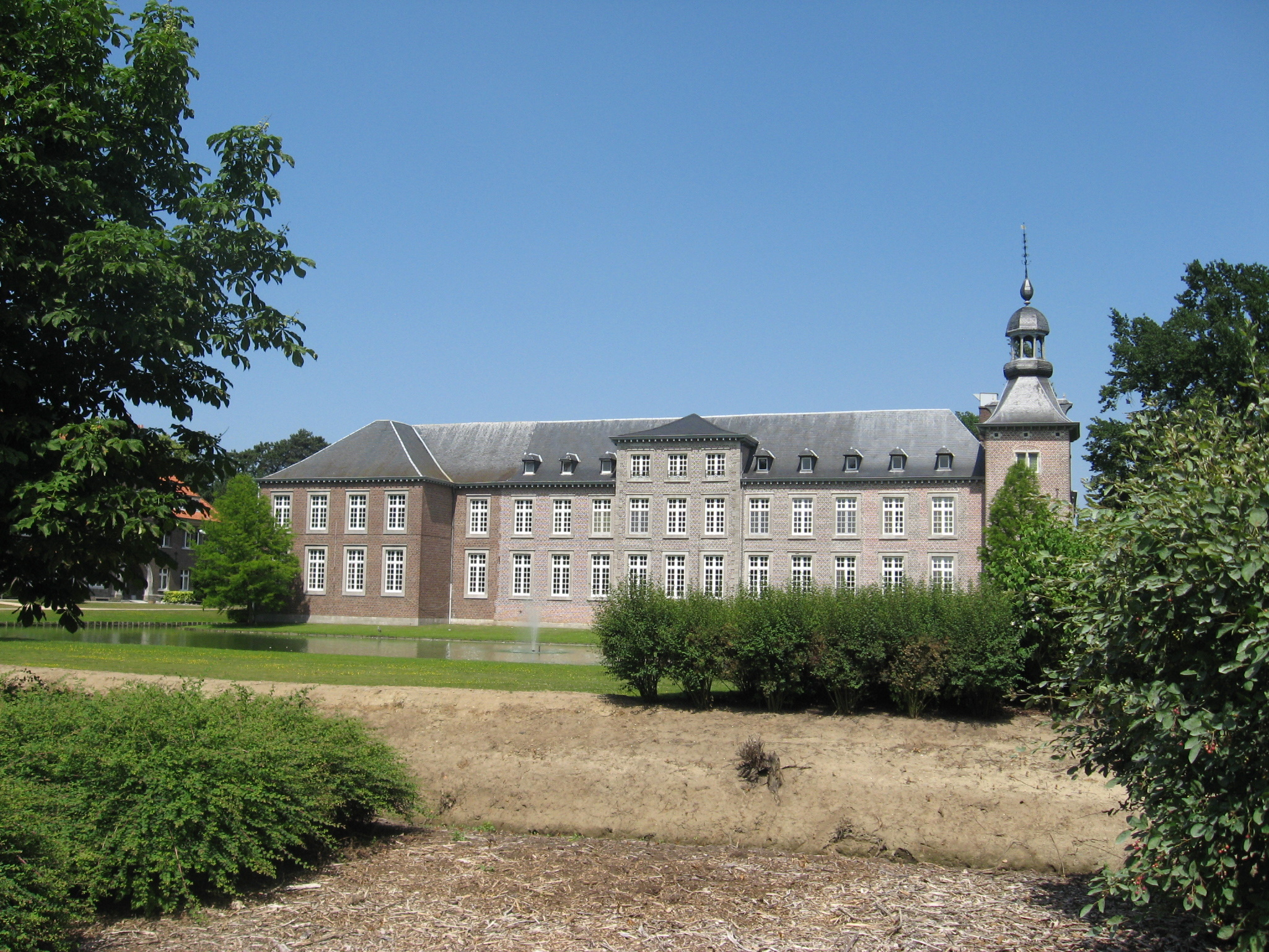 Voormalige burcht, nu schoolgebouw Mariaburcht in Stevoort